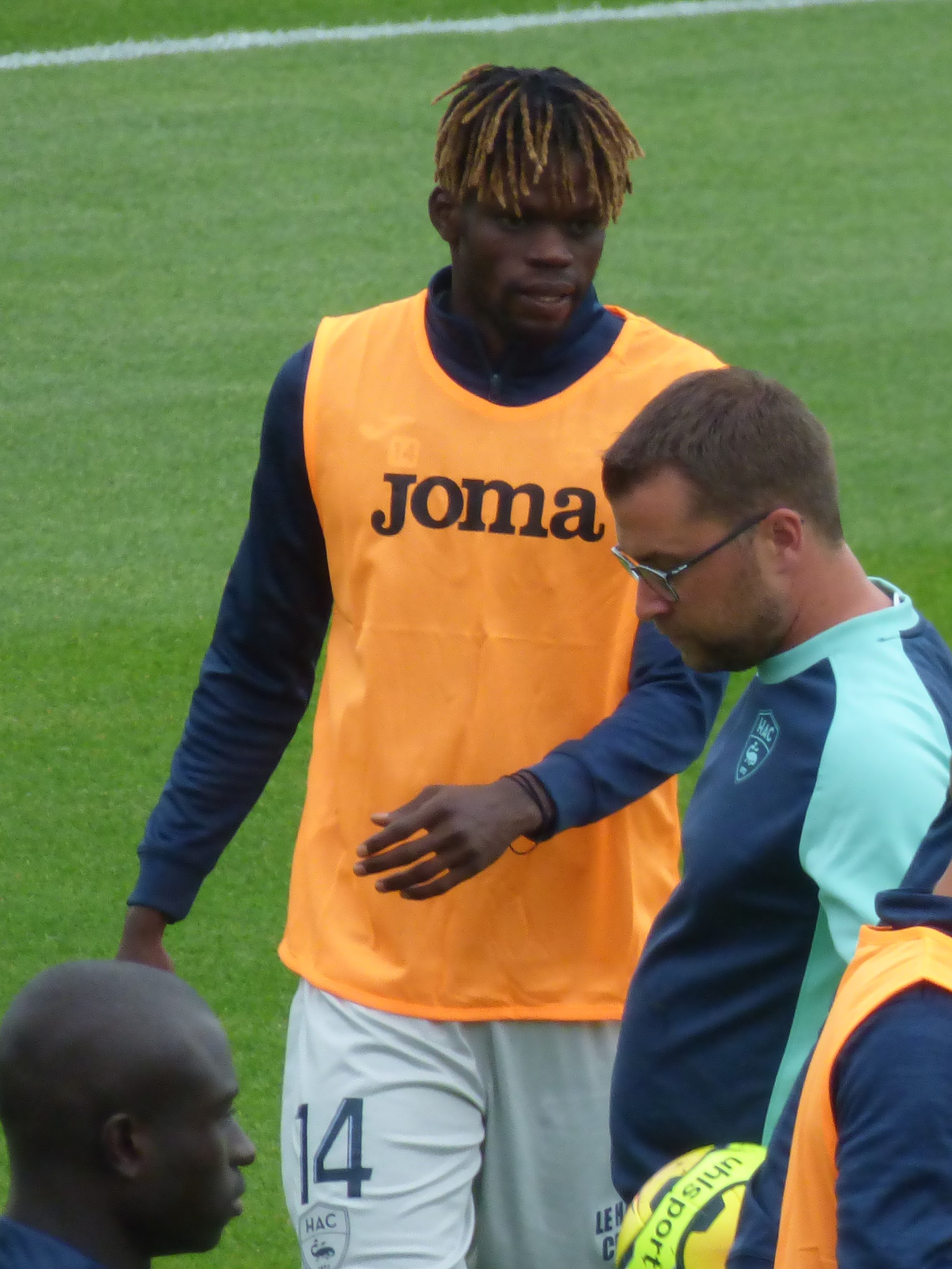 Jamal Thiaré lors du match amical RC Lens / Le Havre, le 16 juillet 2020, au Stade Paul-Guerre de Billy-Montigny.